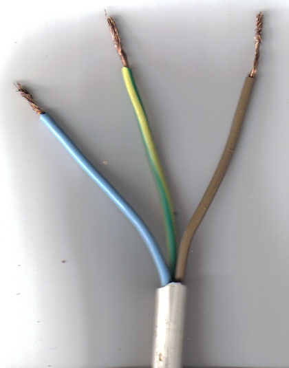 cavo elettrico 3x1.5